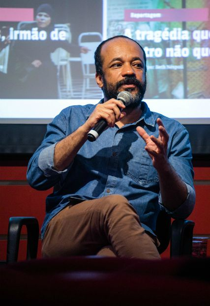 José Fernando Peixoto de Azevedo em conversa no 24ª edição do Encontro com o Espectado 2018